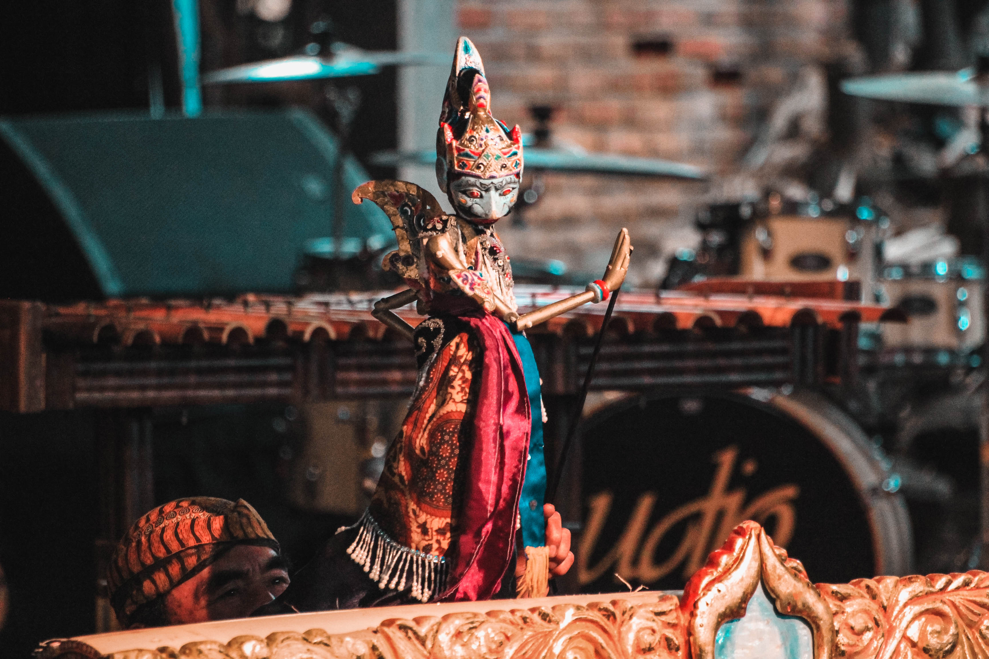 Menghidupkan sesuatu yang mati menjadi budaya bermakna... Itulah tugas dalang